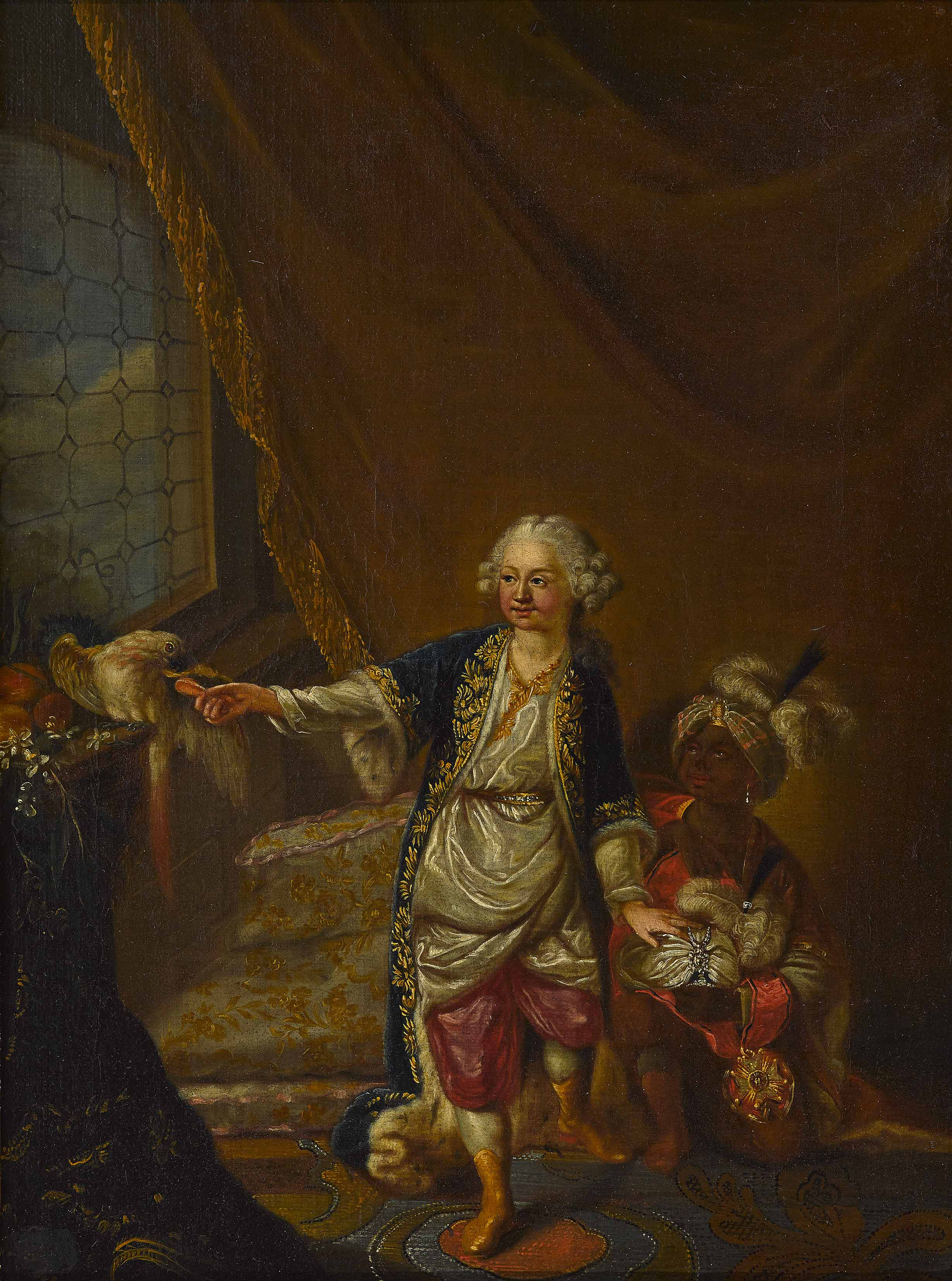 Prinz Maximilian Joseph von Pfalz-Zweibrücken (1756–1825)